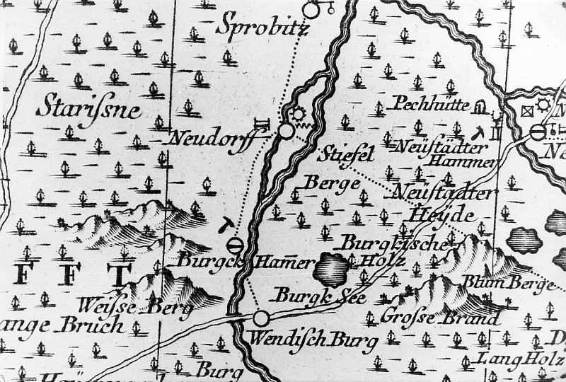 Original image description from the Deutsche Fotothek Spreetal-Burgneudorf. Oberlausitzkarte, Schenk, 1759